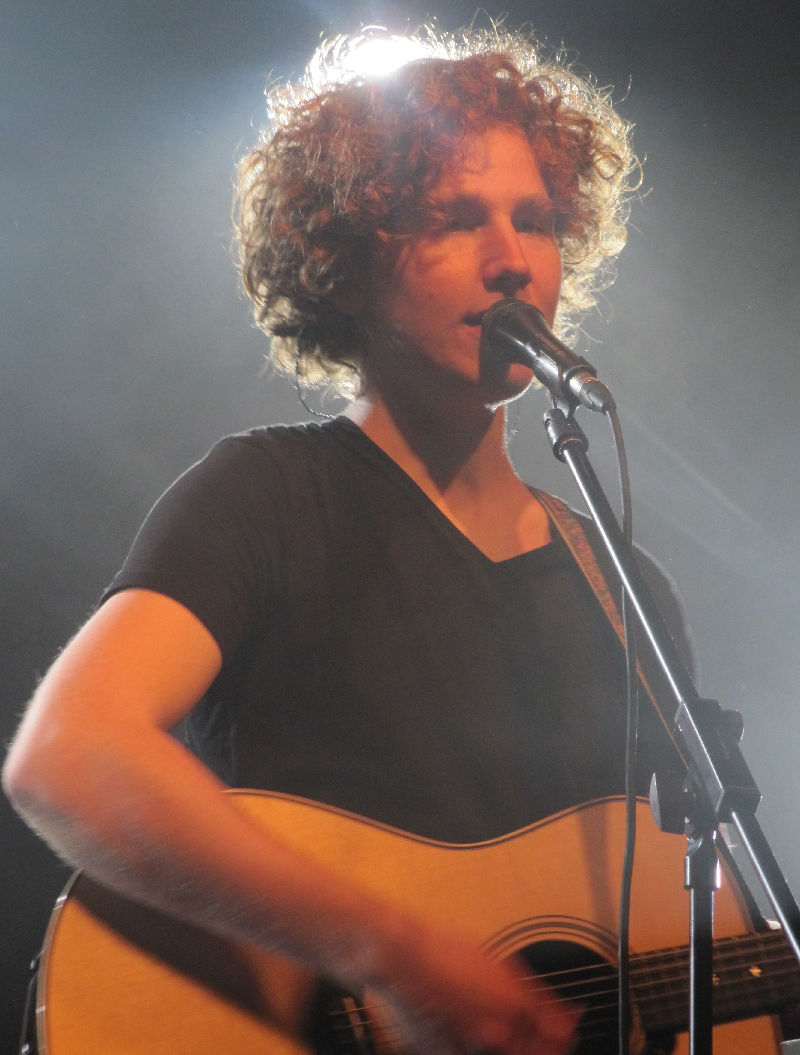 Michael Schulte (Singer/Songwriter). Dieses Bild wurde am 07.10.2012 in der Essigfabrik in Köln aufgenommen.